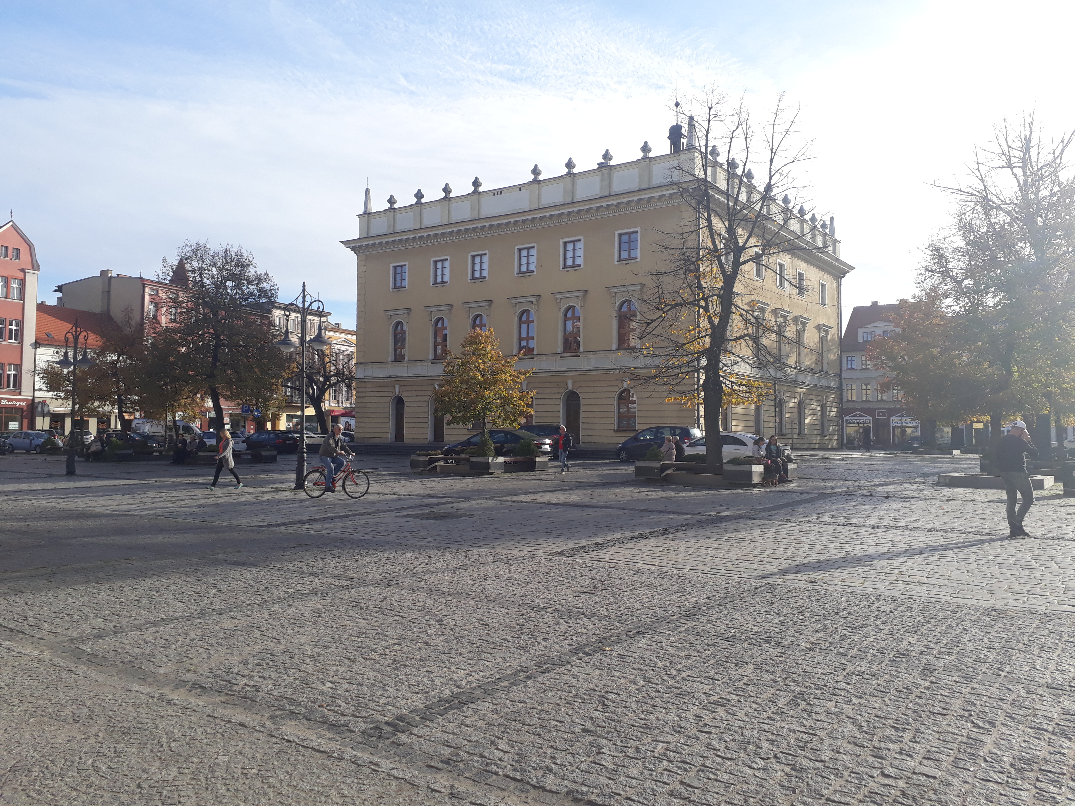 A picture showing the main square of Ostrów Wielkopolski, Poland Obraz pokazujący rynek i ratusz w Ostrowie Wielkopolskim